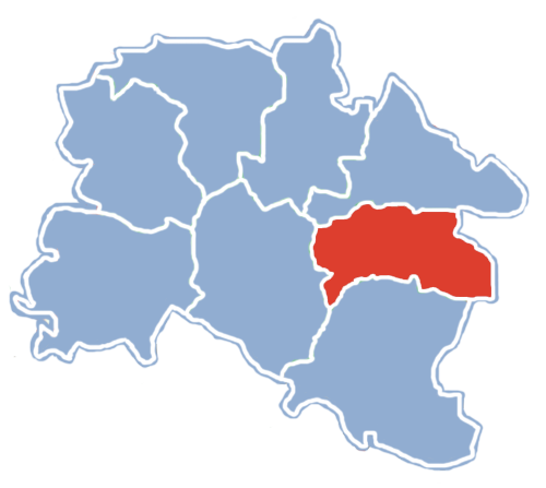 Położenie gminy Strzelce Wielkie na mapie powiatu pajęczańskiego.